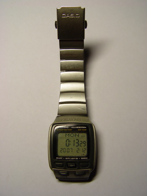 Eine Casio DB 37 H